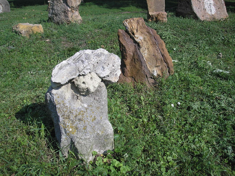 Village Prelesne. Ukraine. Donetsk region.